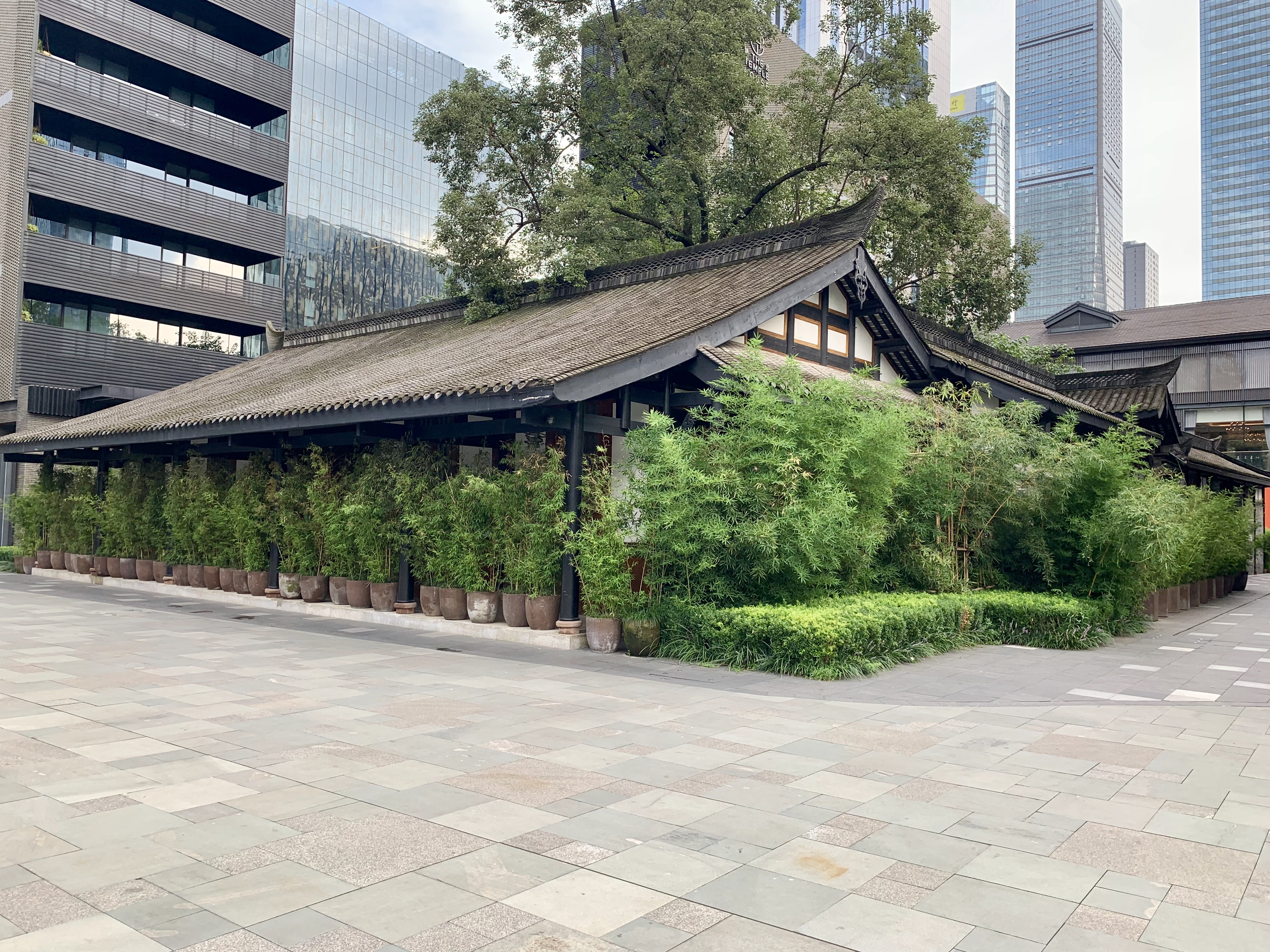 成都远洋太古里内章华里庭院，先为博舍酒店内谧寻茶室